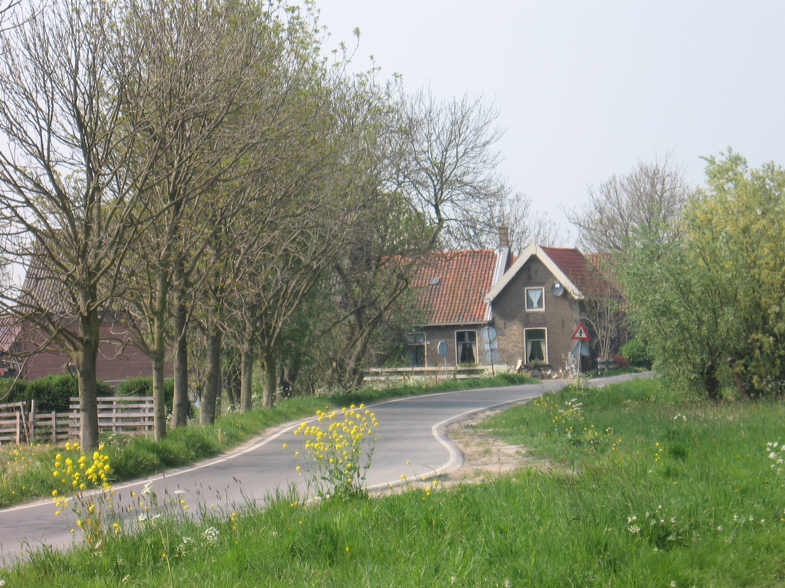 polderweg (sluiproute) tussen Delft en Schiedam